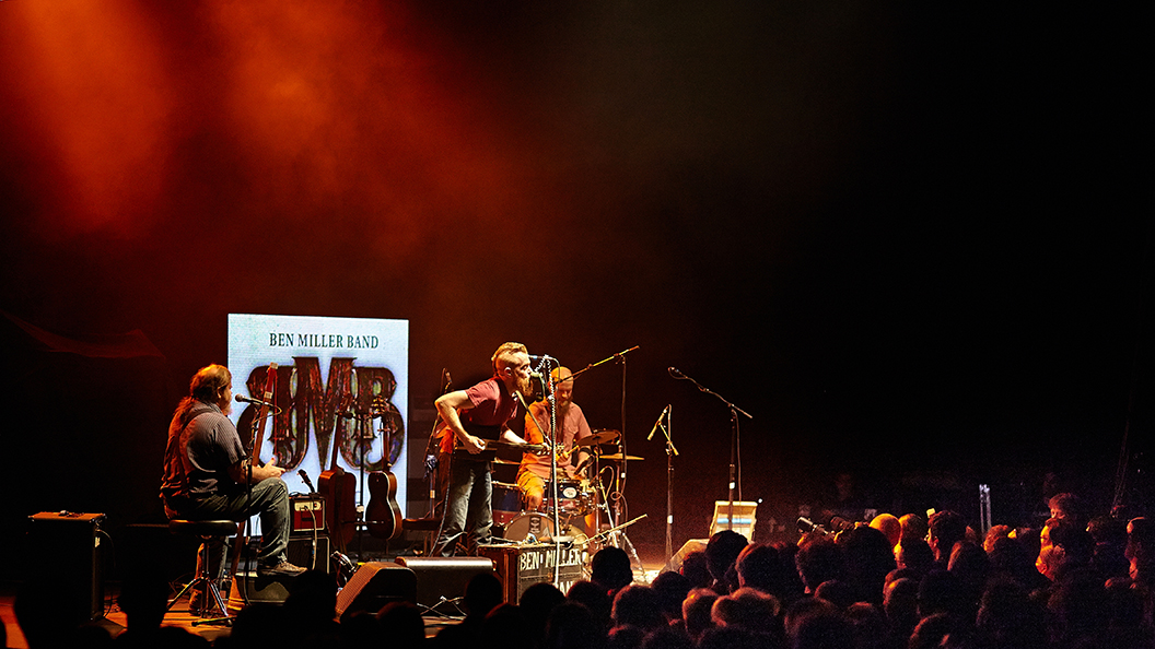 Ben Miller Band (Saarbrücken, Germany, 2014) by Christian Dueringer